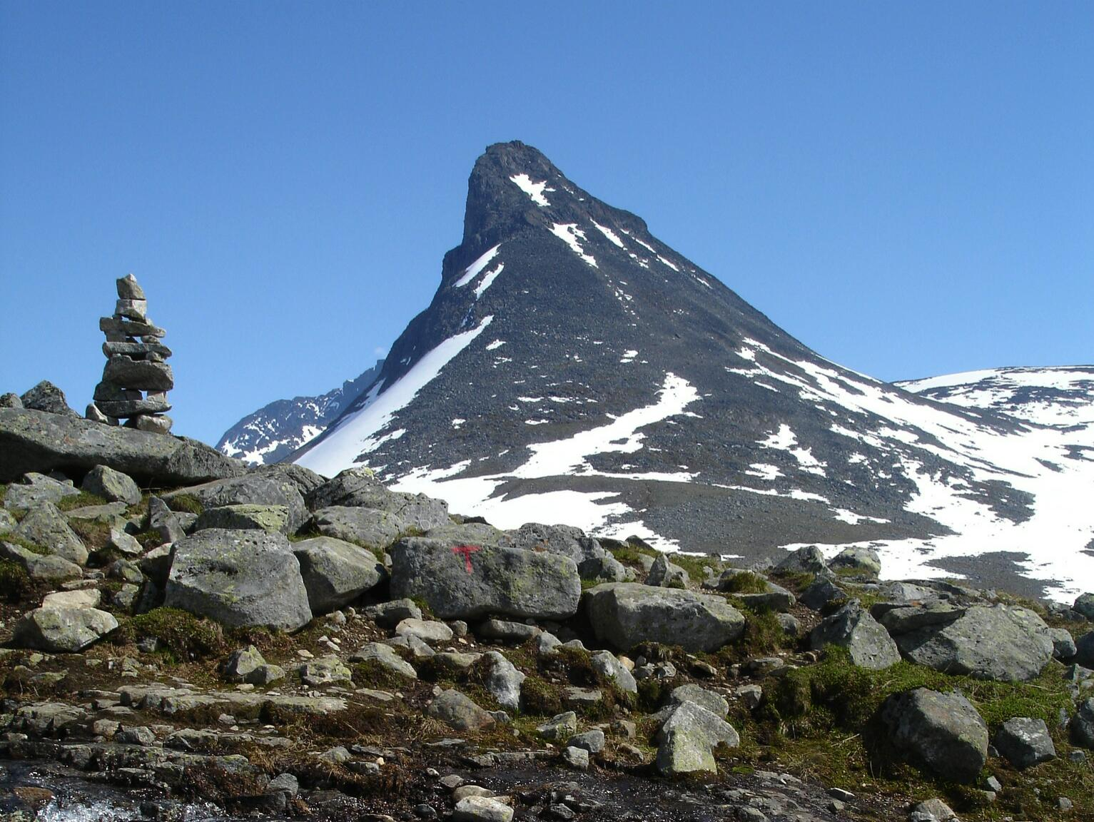 der Berg Kyrkja in Jontunheimen